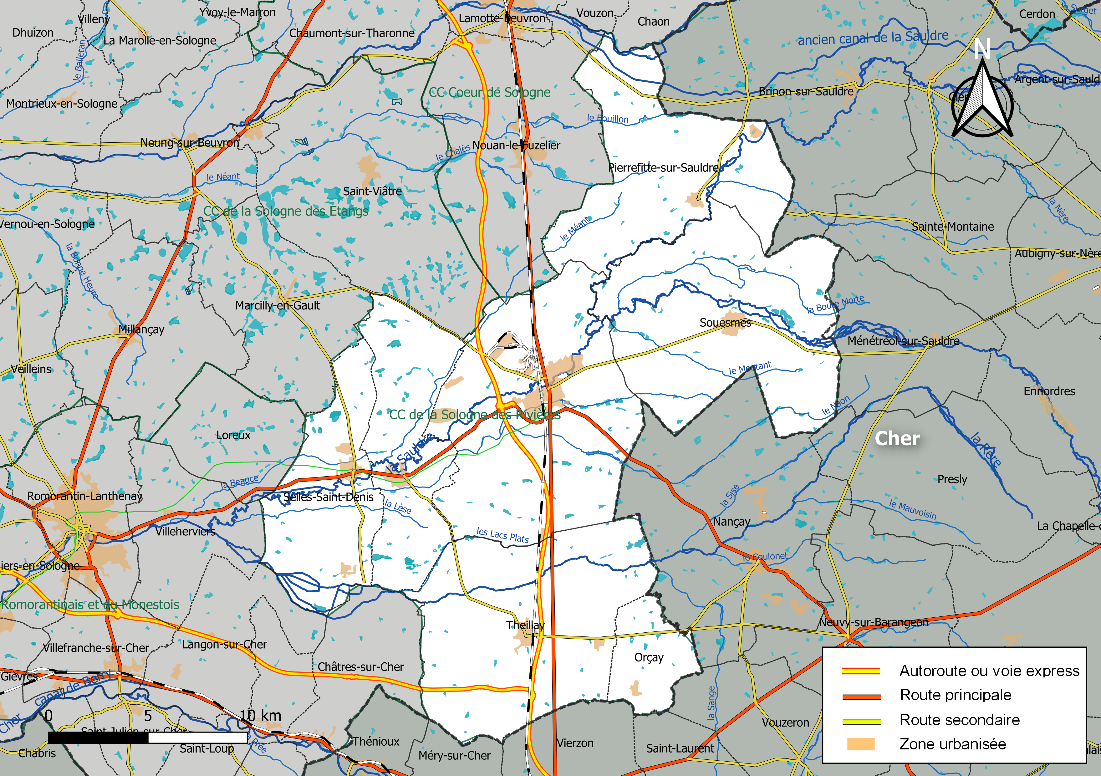 Carte de la communauté de communes La Sologne des rivières, département de Loir-et-Cher, France. Composition au 1er janvier 2019.